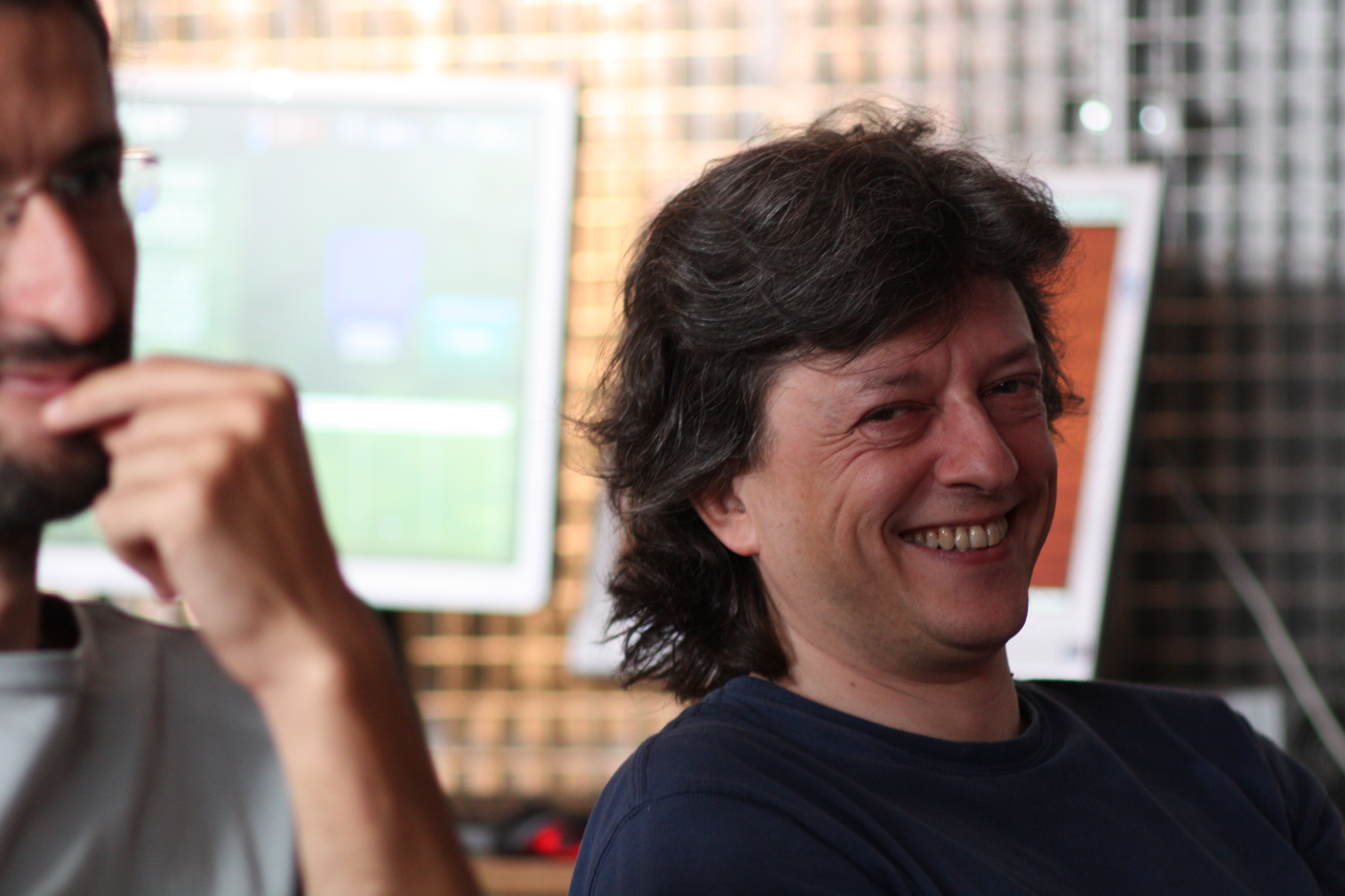 Javier de la Cueva